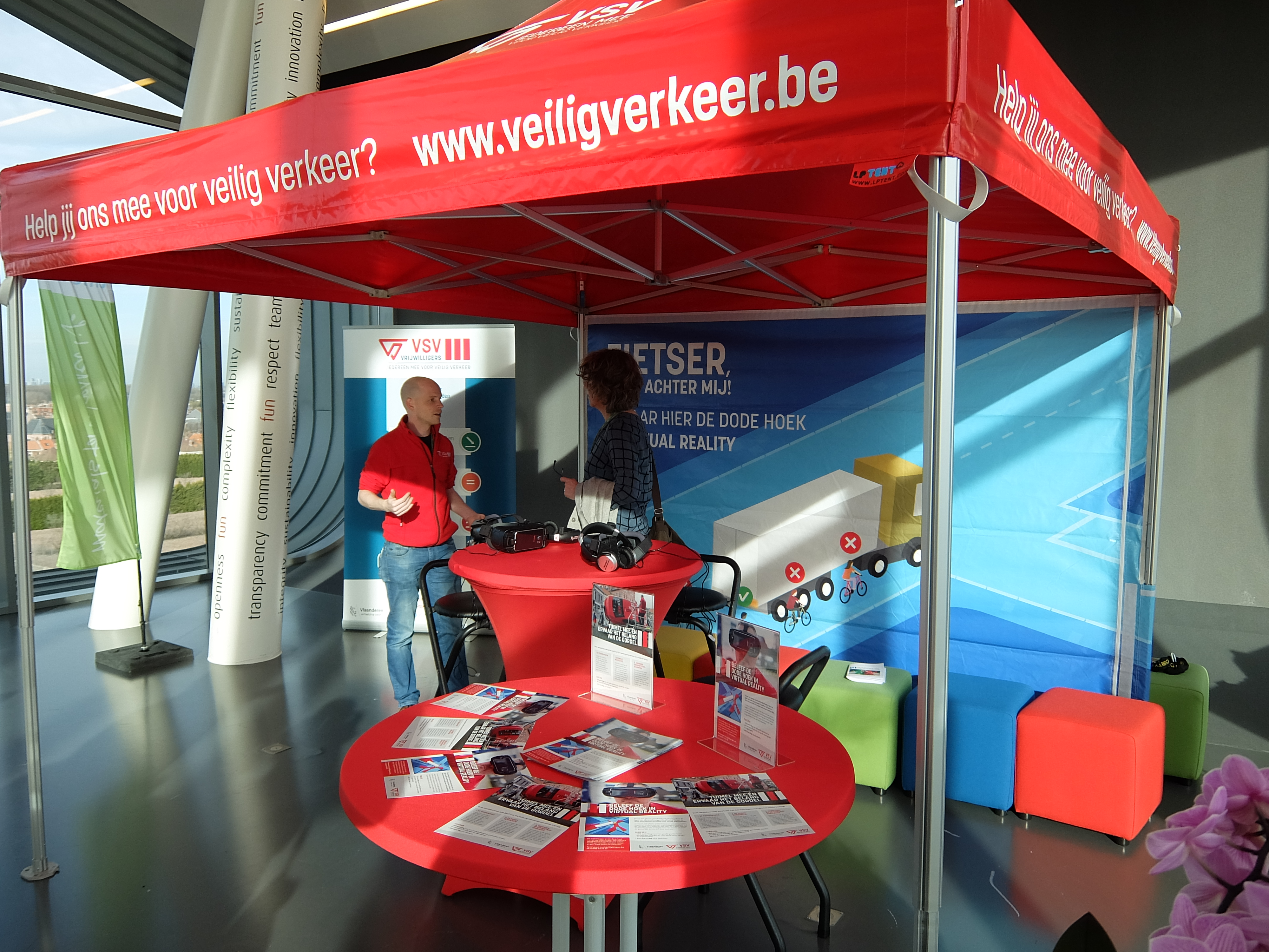 VSV-actie in een bedrijf rond virtual reality